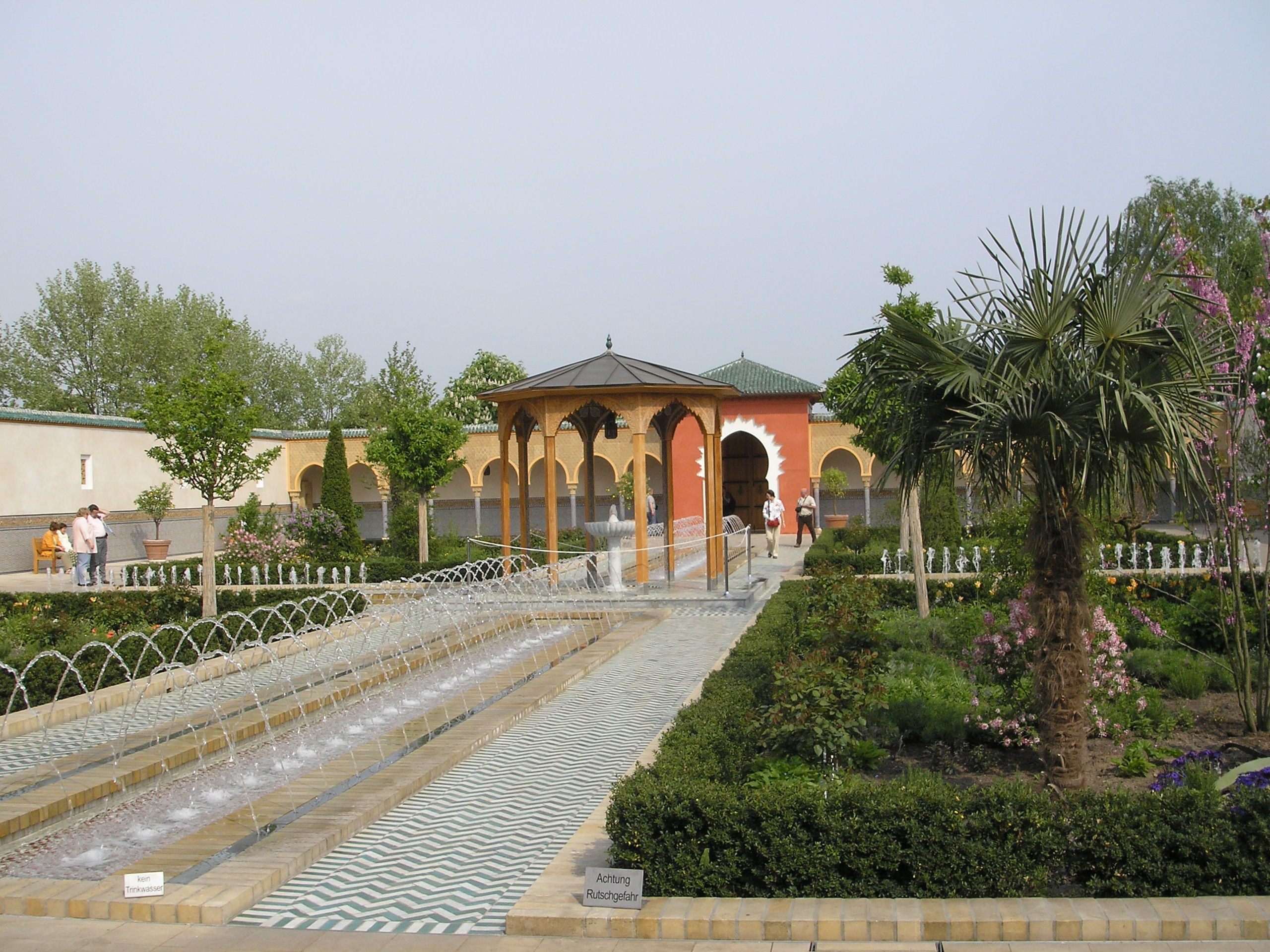 Arabic garden in Gärten der Welt, Berlin-Marzahn.